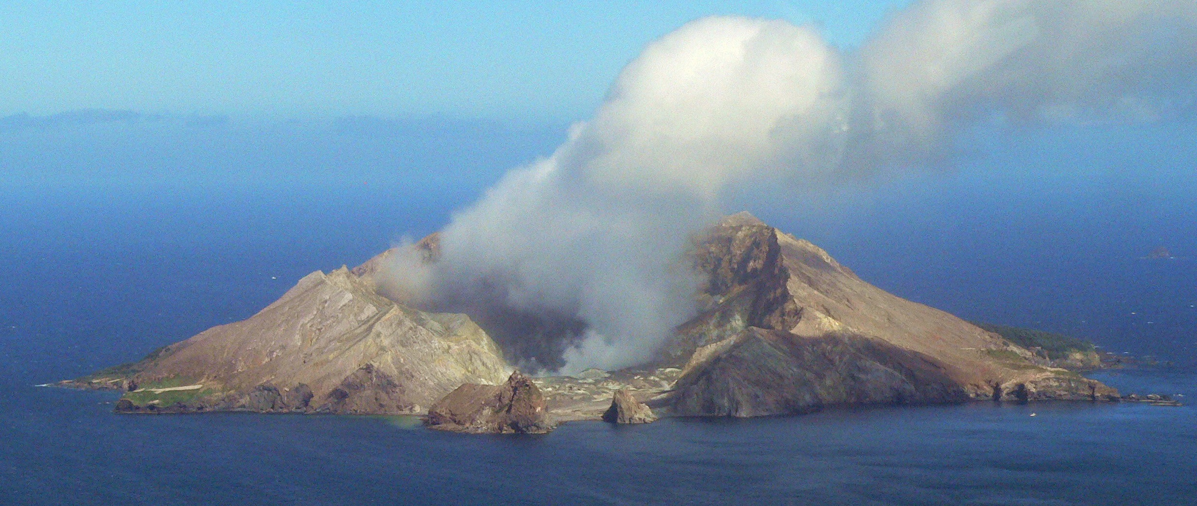 Landeanflug mit Helikopter zum Krater von White Island